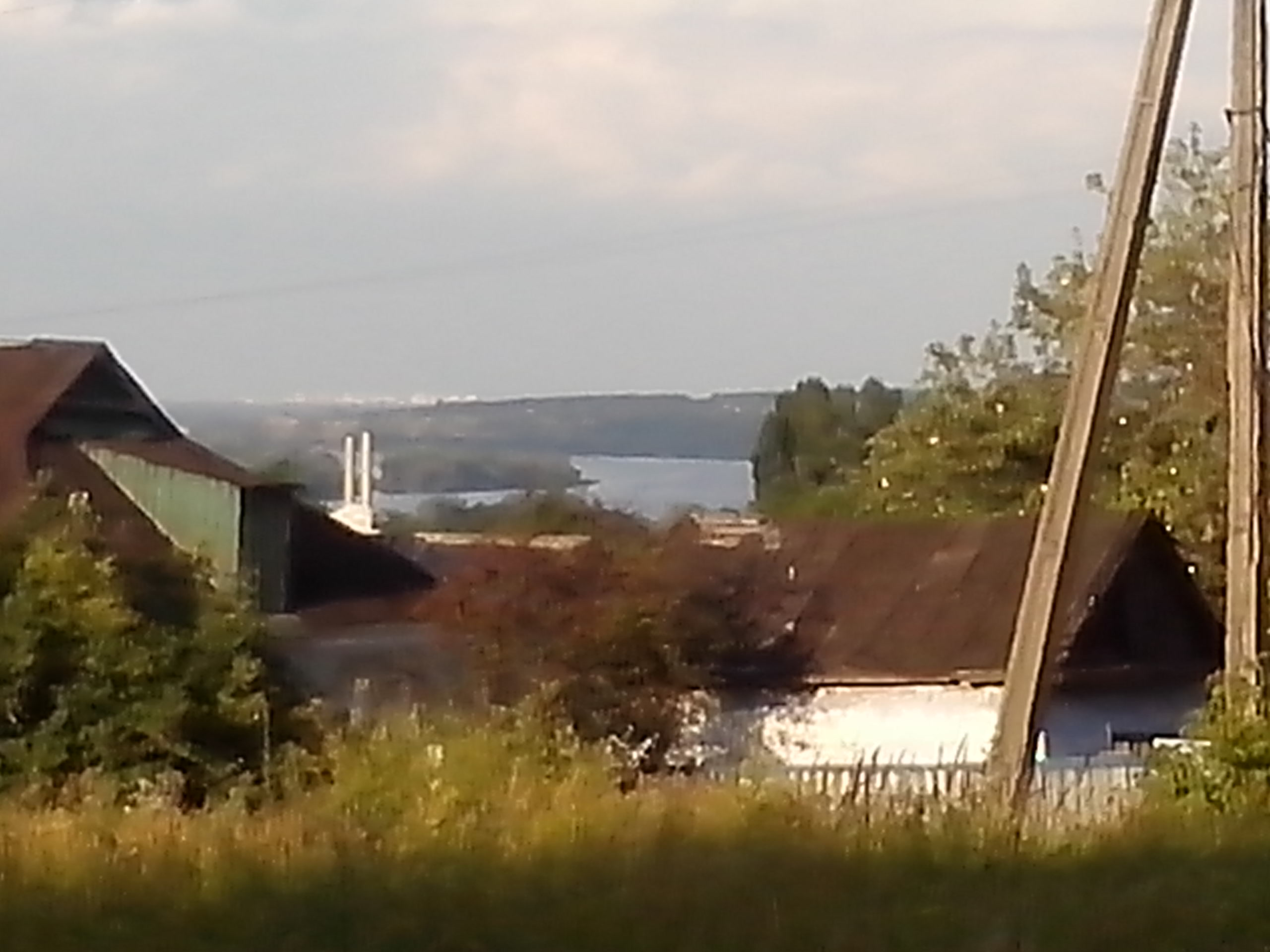 Пейзажі Караухівки